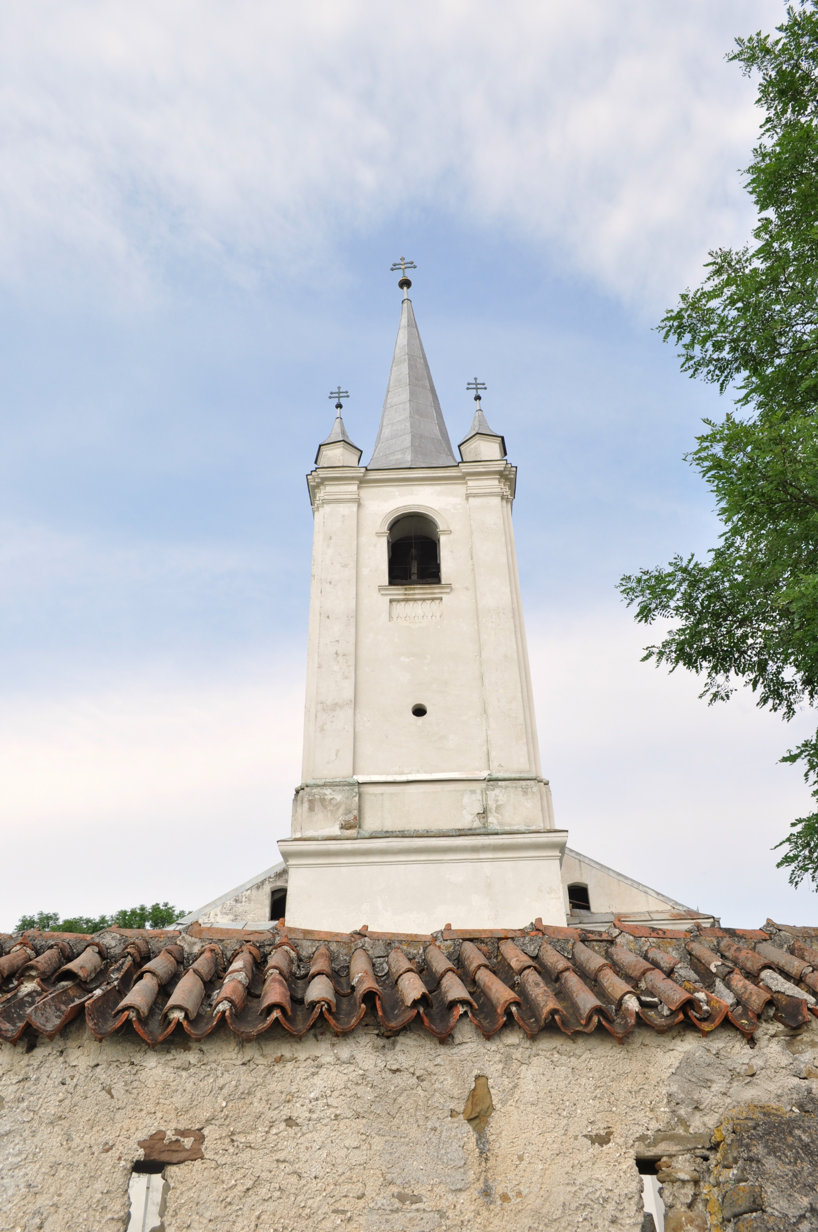 Sânmartin, Harghita